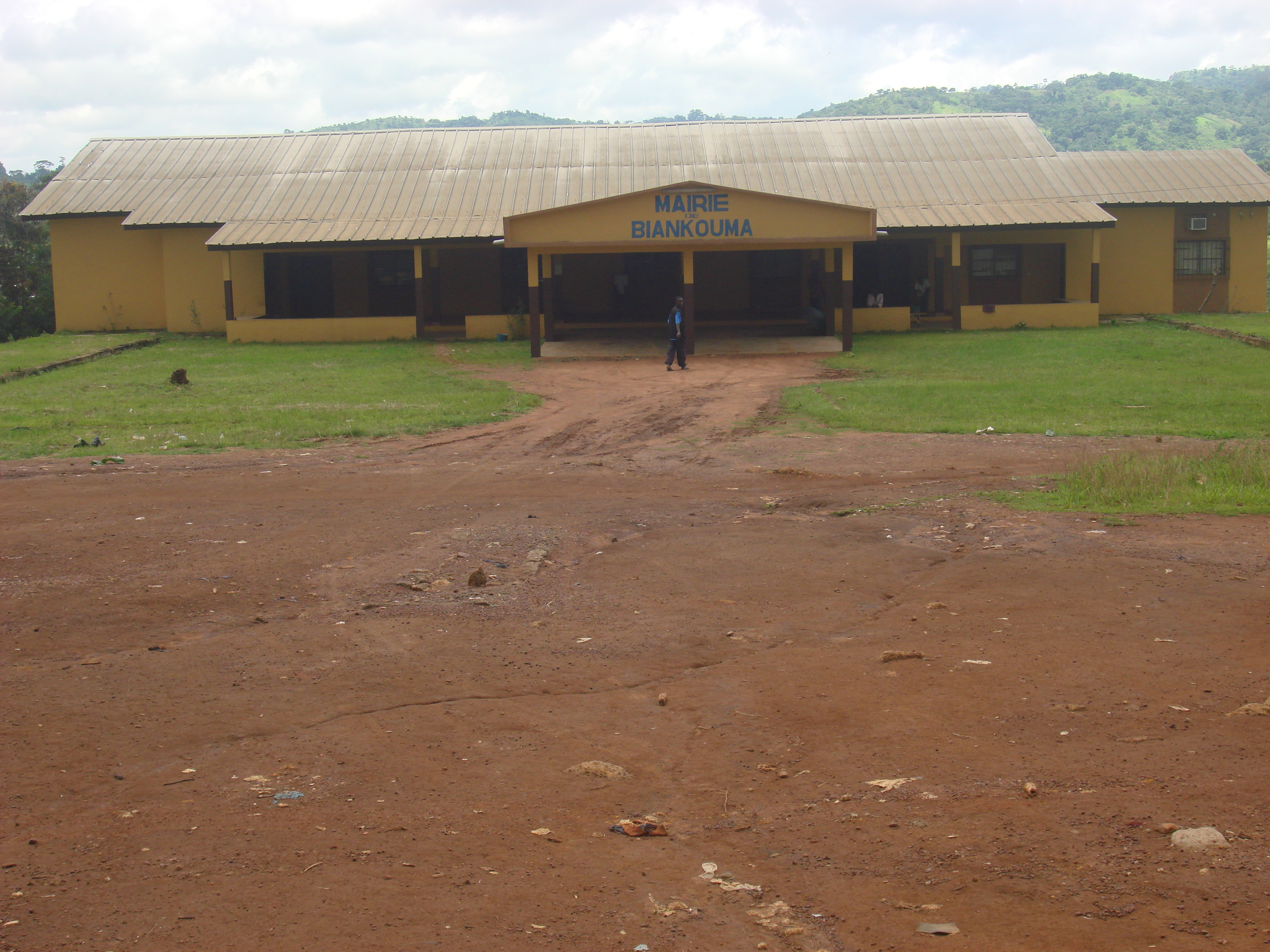 Siège de la Mairie de Biankouma en Côte d'Ivoire